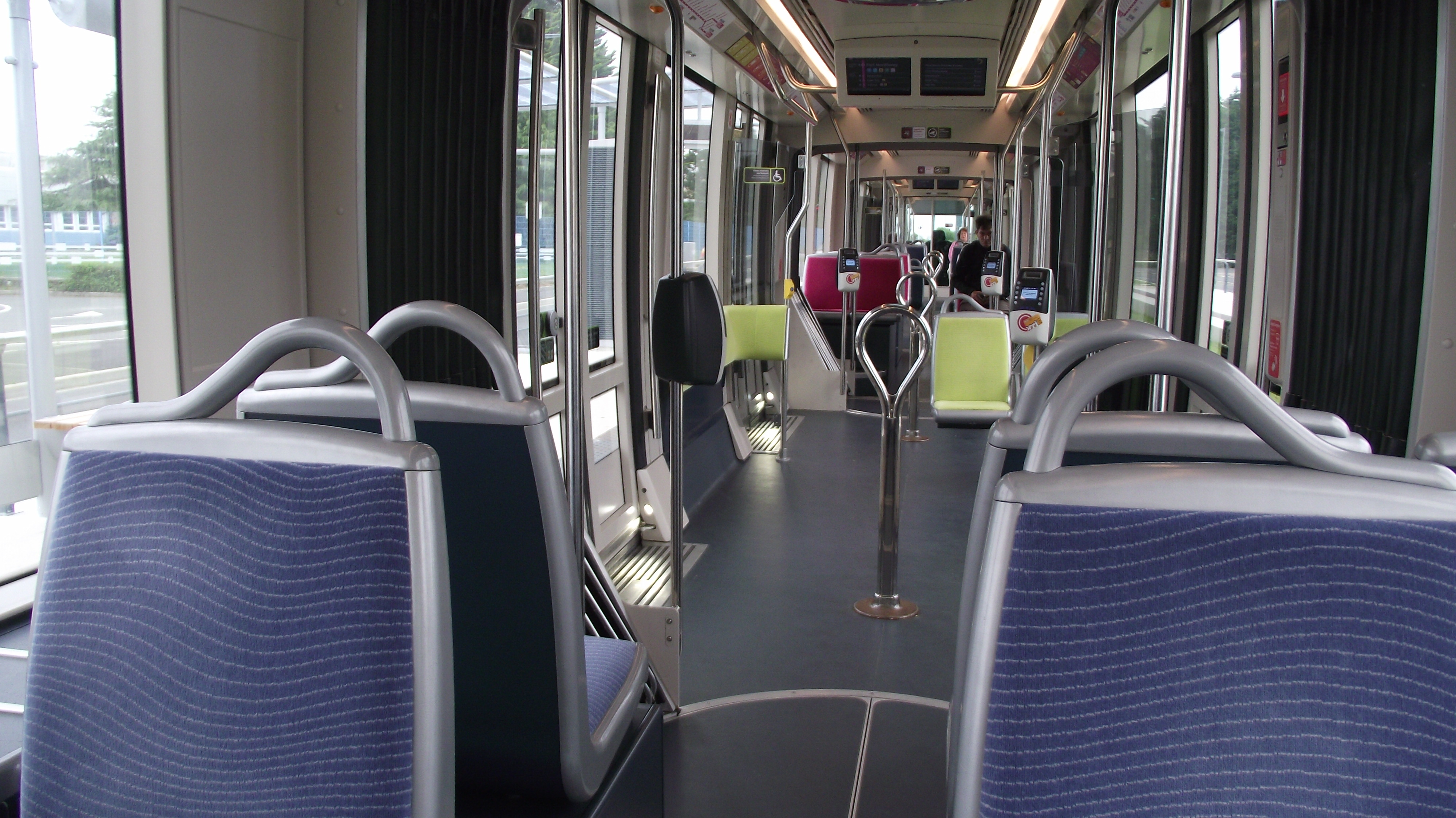 Tram interieur van Brest